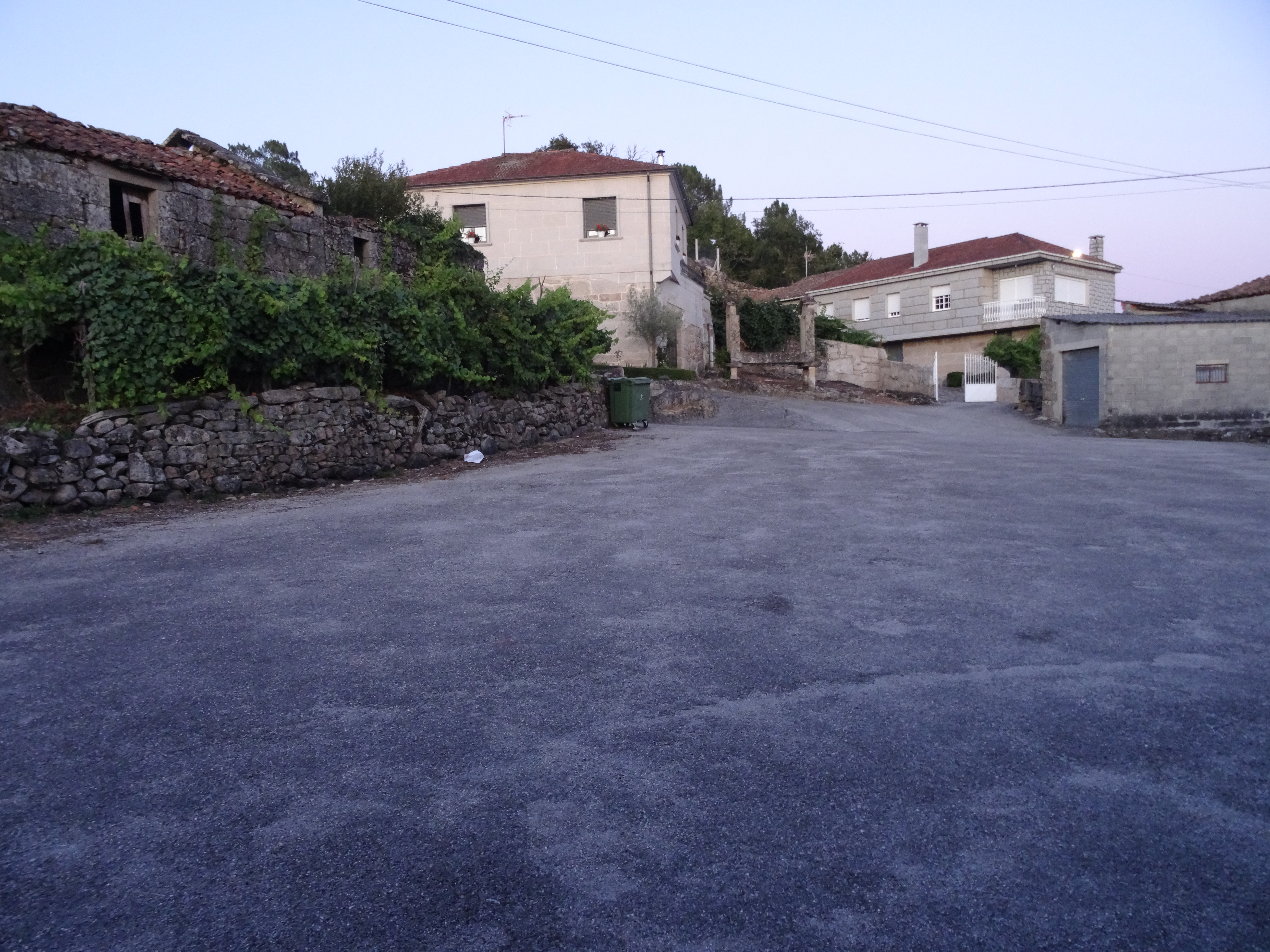 Ver título.